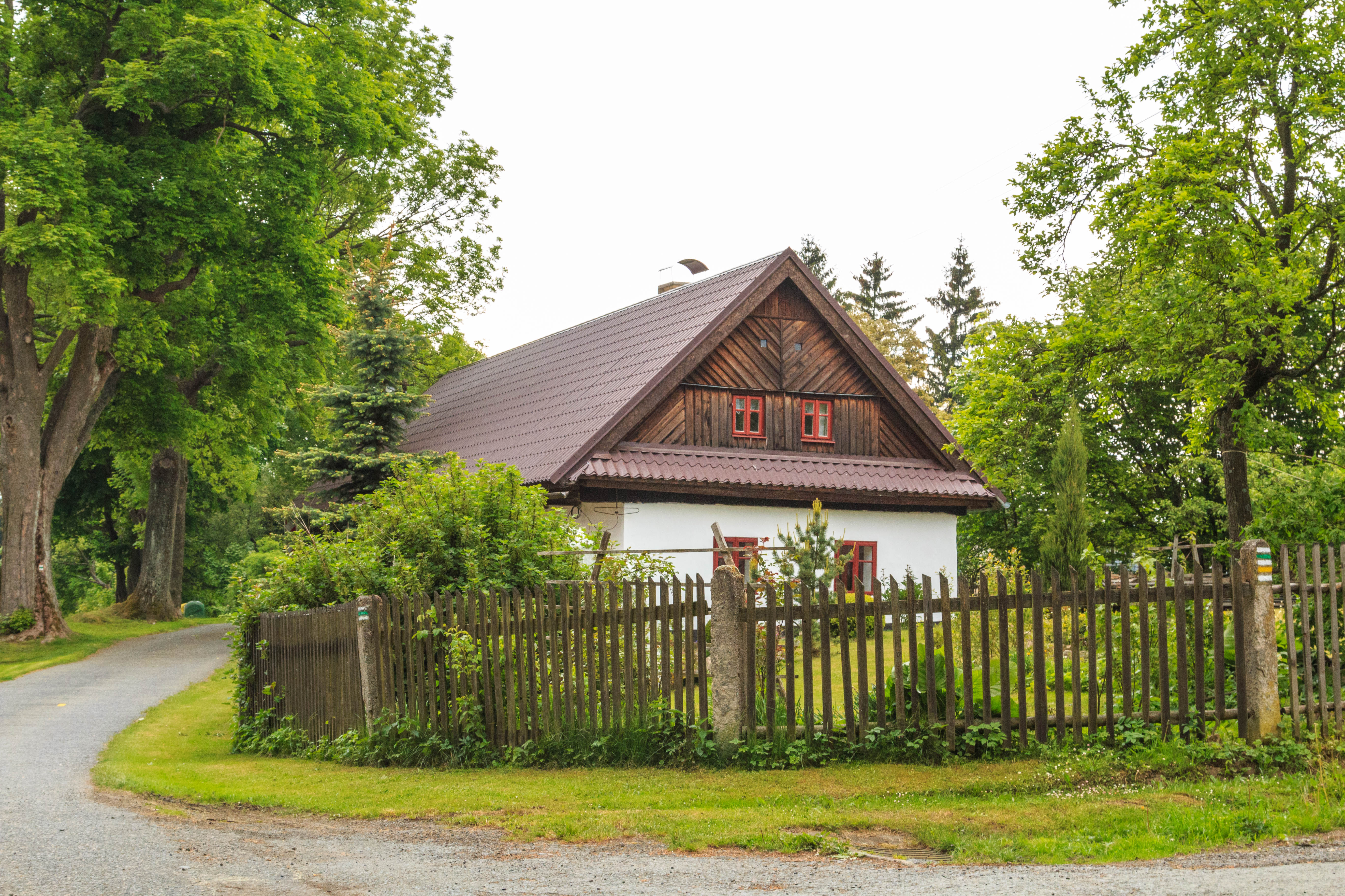 Spálava č. 3 Project: Chráněná území.